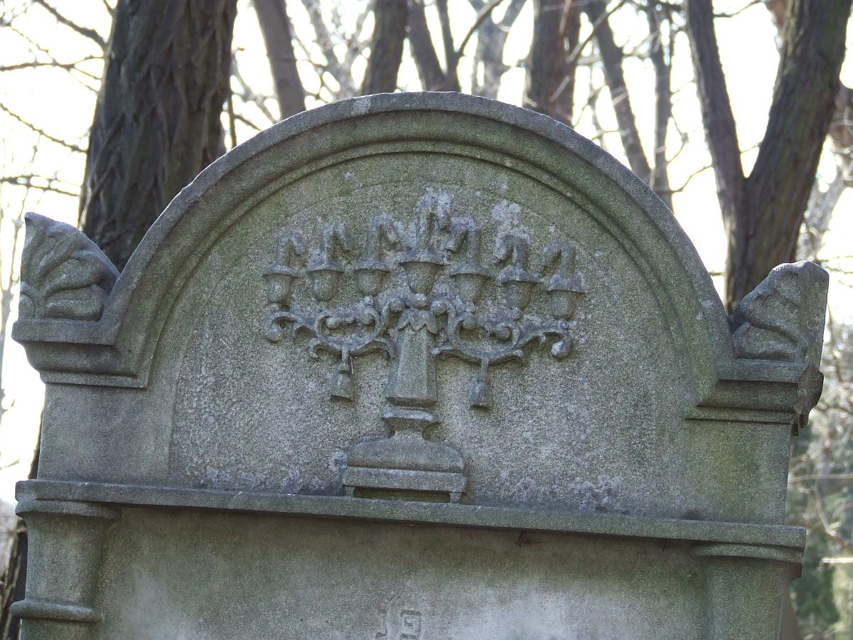 Symbolika